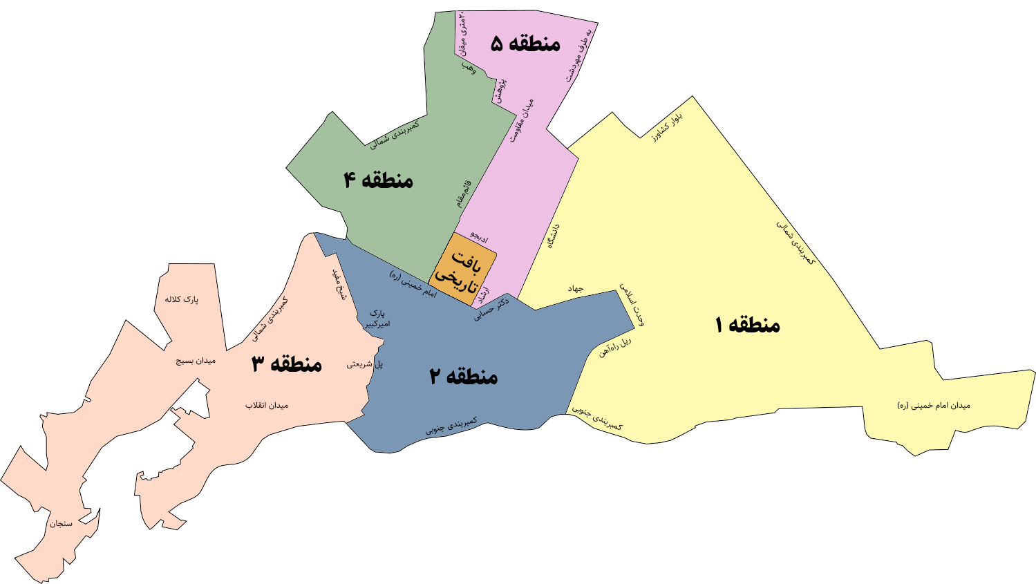 موقعیت مناطق تقریبی است و مناطق مسکونی نشان داده شده است